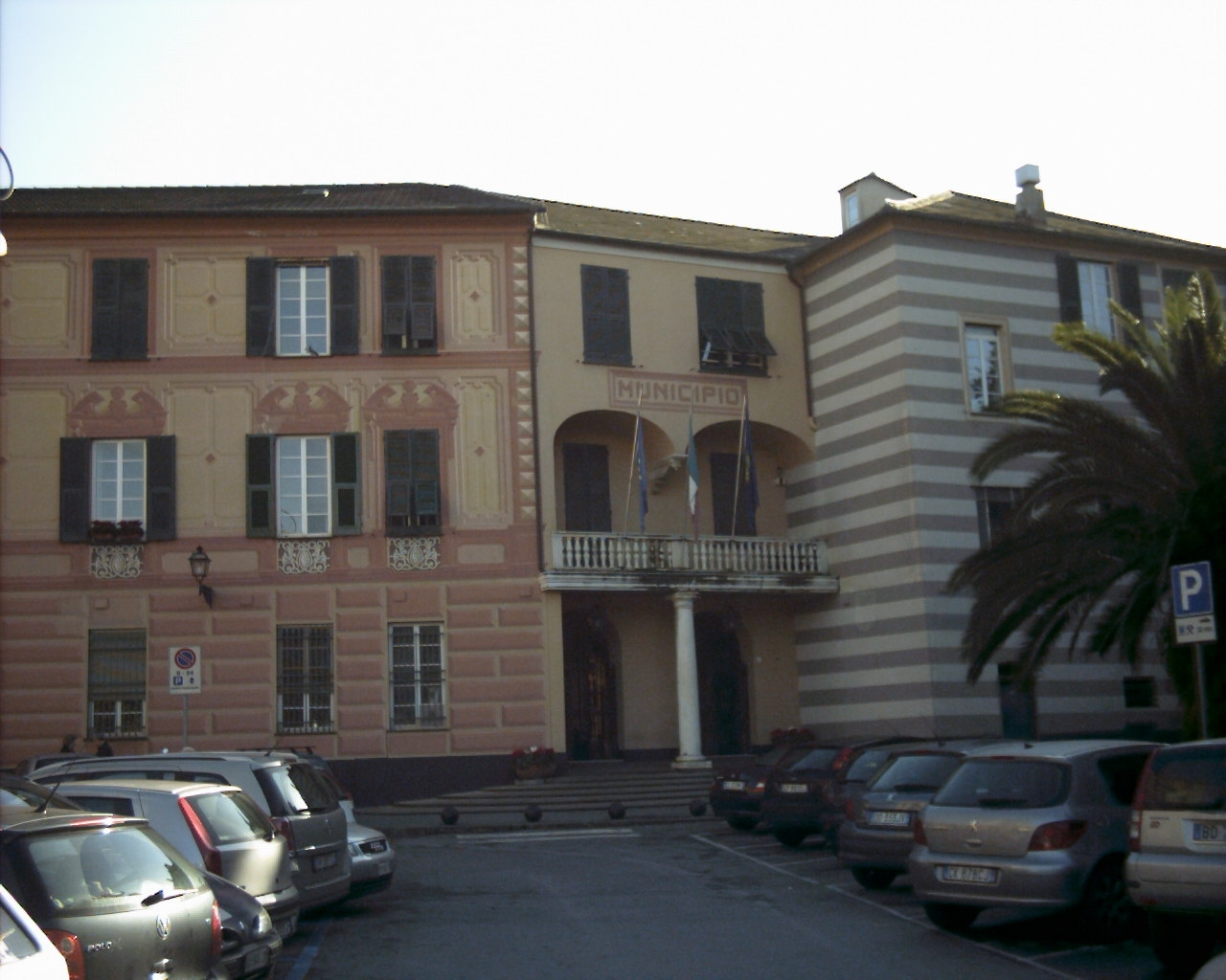 Palazzo Municipale di Rapallo